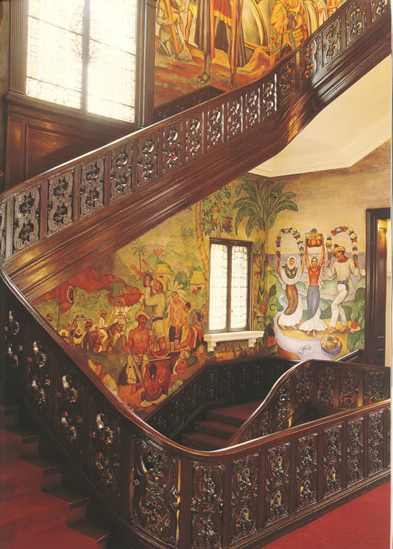 Murales en la antigua Embajada de México en Washington